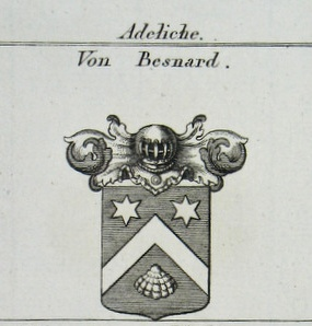 Wappen des bayerischen Adelsgeschlechtes von Besnard (jüngere Linie)